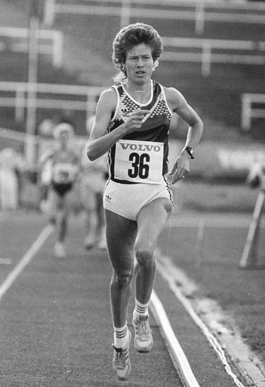 Kathrin Ullrich ADN-Friedrich Gahlbeck 18.8.90 Dresden: 41.DDR-Meisterschaften in der Leichtathletik Letzter DDR-Meister beim 3000 Meterlauf der Frauen wurde Kathrin Ullrich (l. SC Berlin) mit 9:00,37 Minuten mit großem Abstand vor dem Feld. Abgebildete Personen: Ullrich, Kathrin: Leichtathletin, Läuferin, SC Dynamo Berlin, DDR